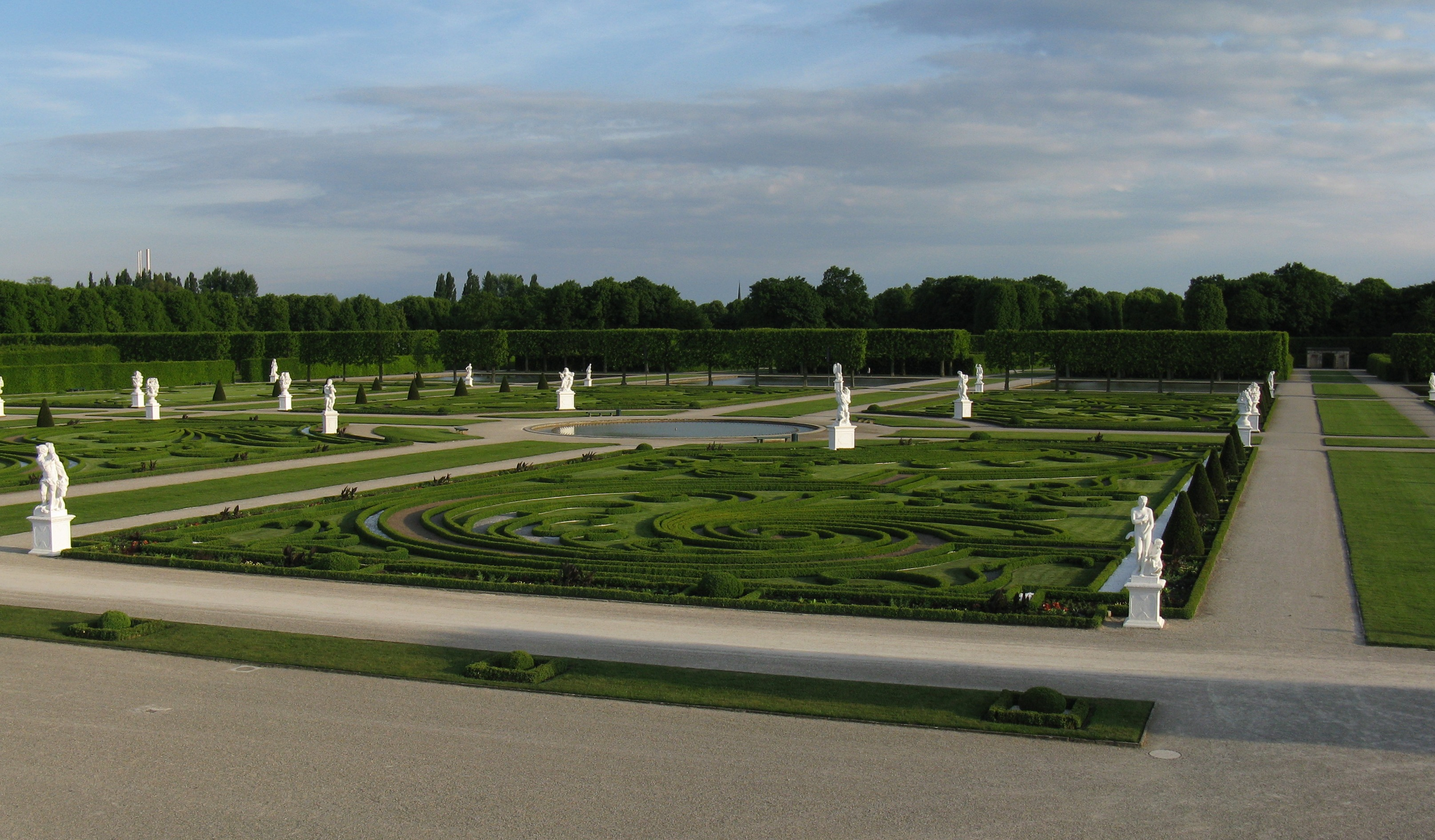 Großer Garten in Hannover-Herrenhausen: Parterre